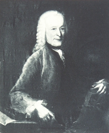 Thomas Spleiß (1705–1775), Schweizer Physiker und Astronom